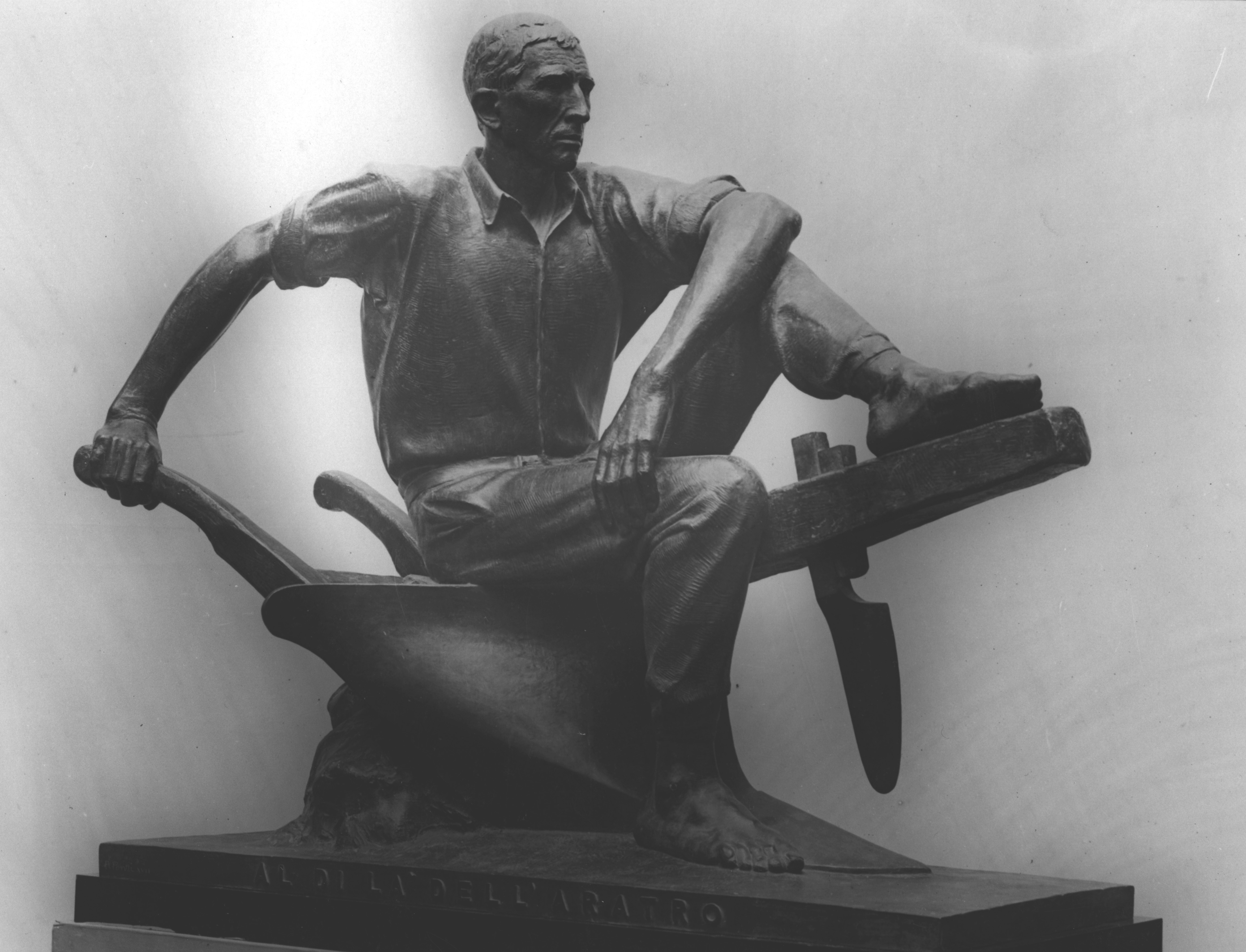 Figura di contadino colto in atteggiamento riflessivo mentre riposa seduto sul proprio aratro